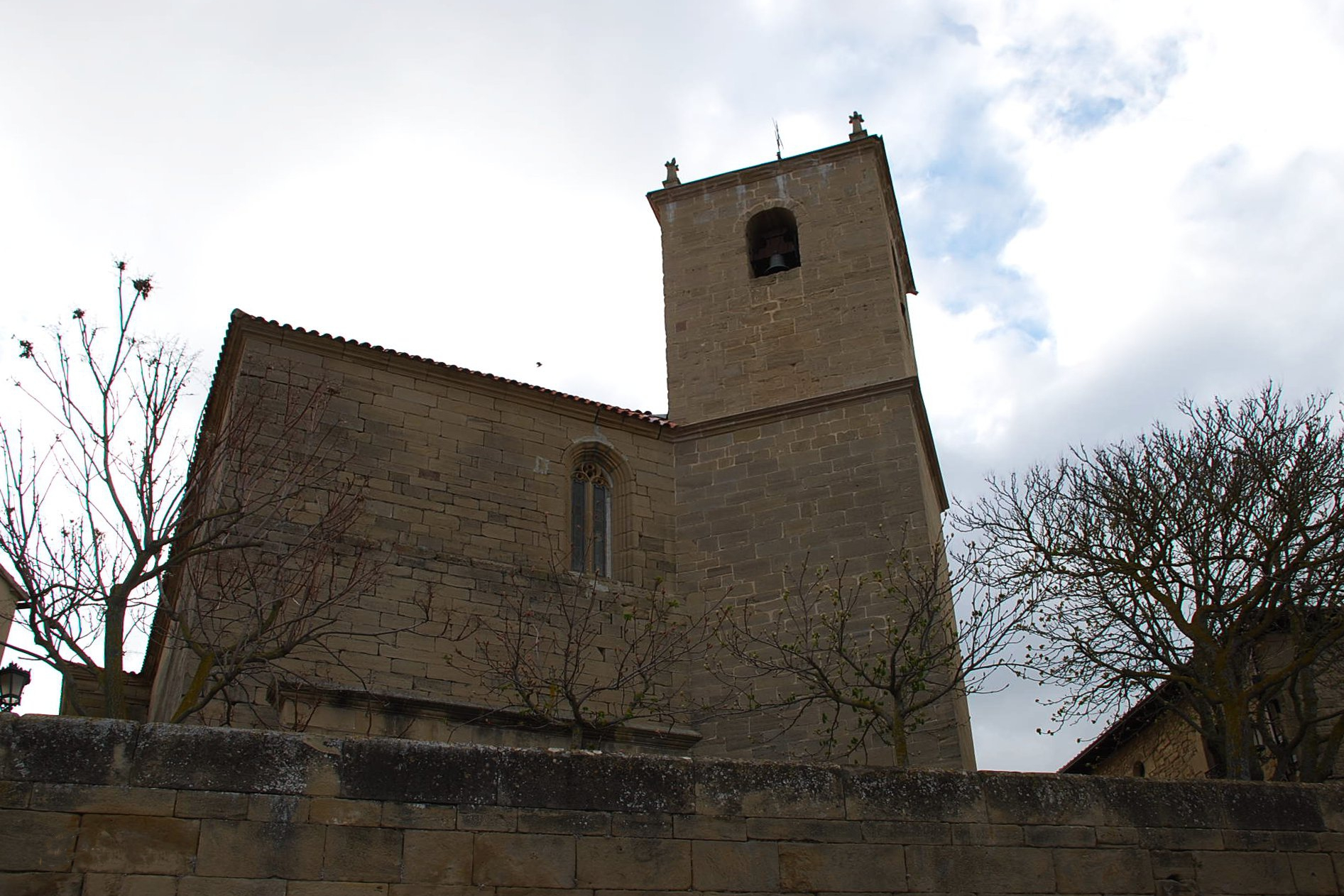 Iglesia de Moreda de Álava (España)